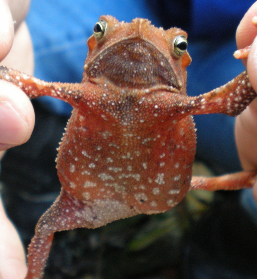 Bufo hoogmoedi